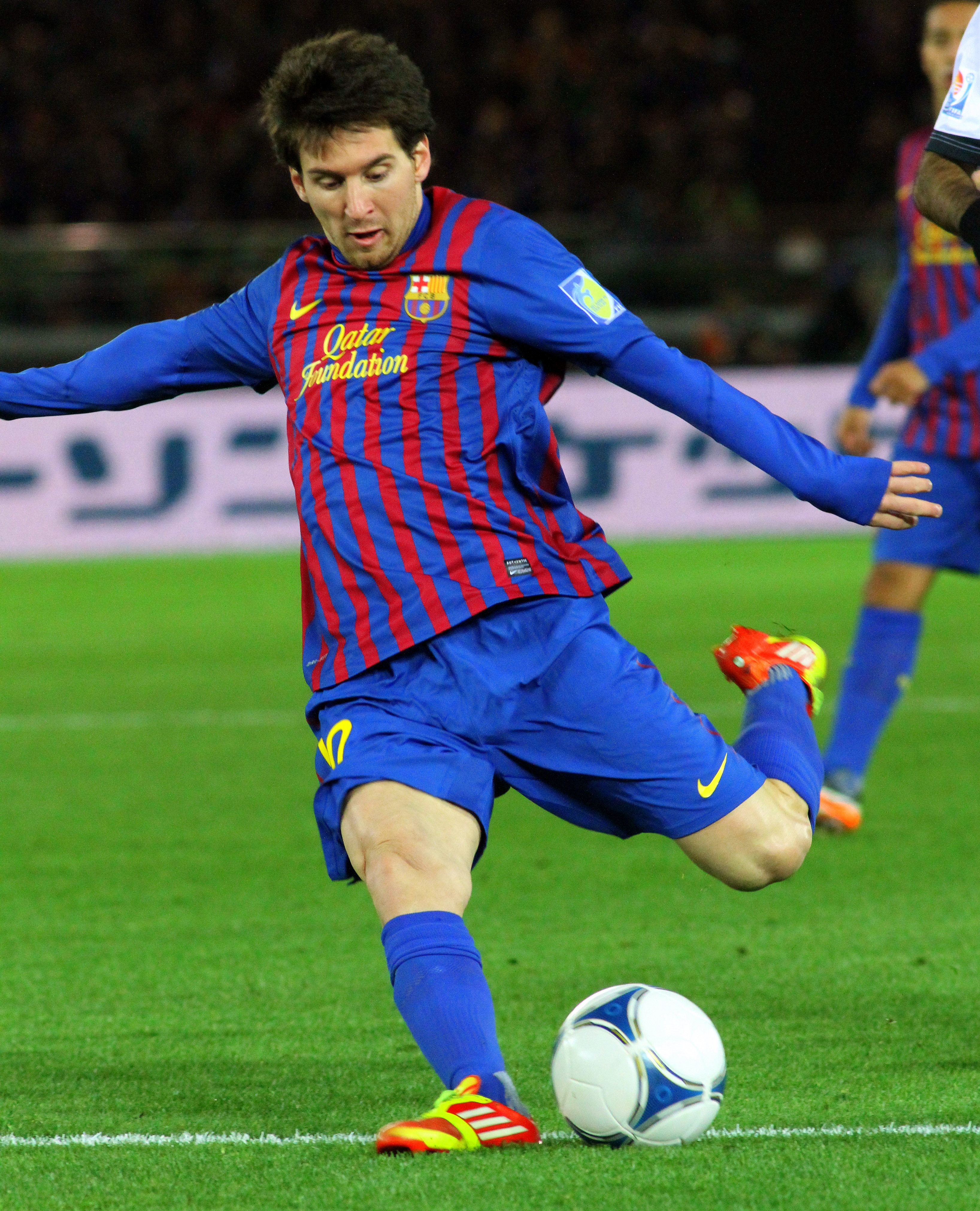 Lionel Andres Messi